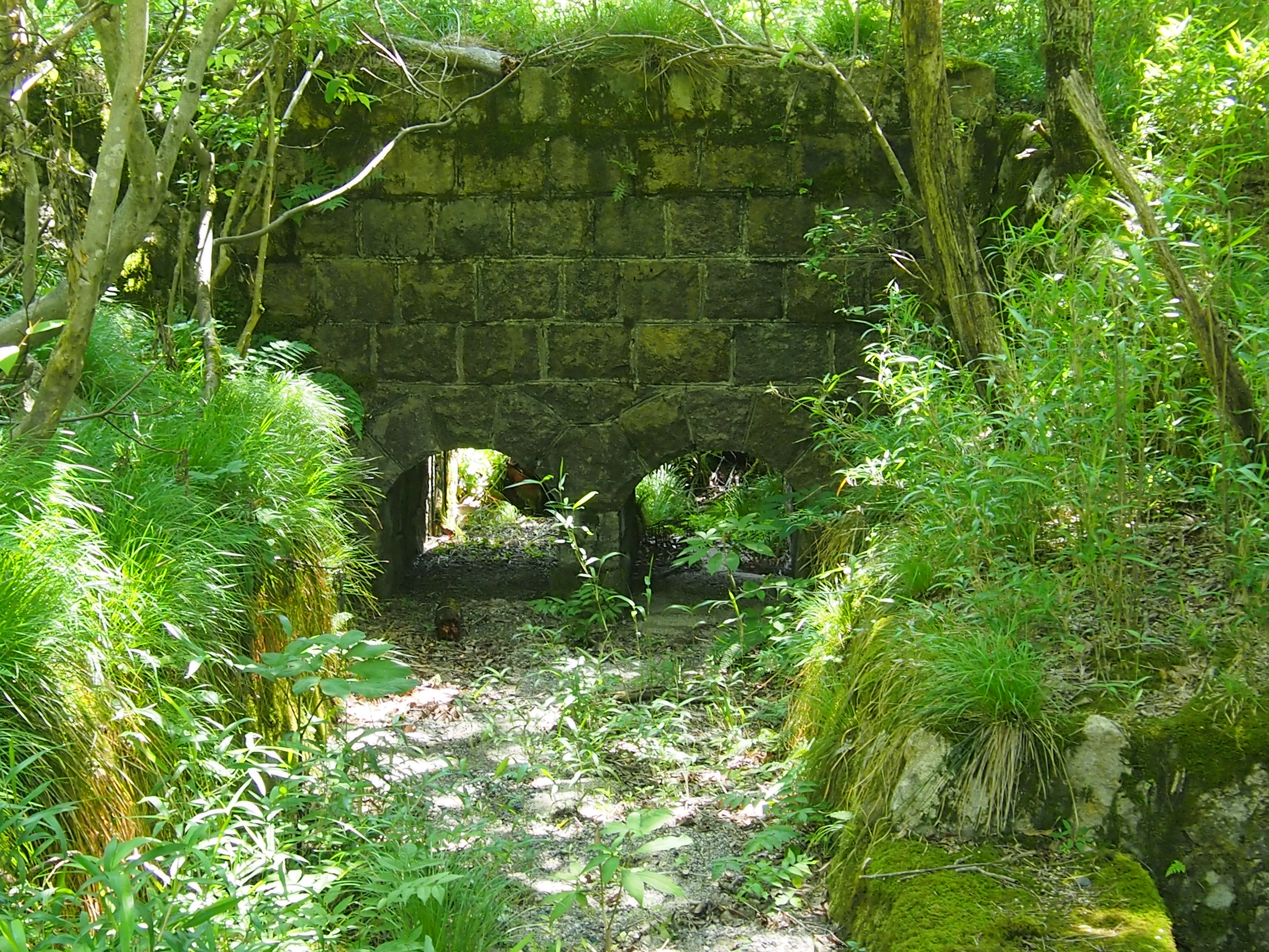 明治時代に開業、昭和30年代まで営業していた、石積みの水路跡が残っている。